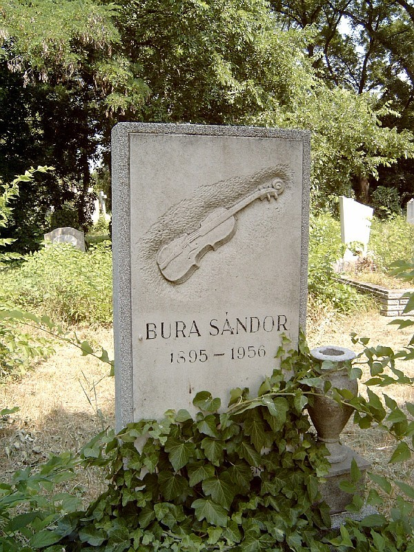 Bura Sándor (Nagyvárad, 1895. október 15. – Budapest, 1956. július 1.) cigányprímás. Bura Károly testvéröccsének sírja Budapesten. Kerepesi temető: 33-1-8